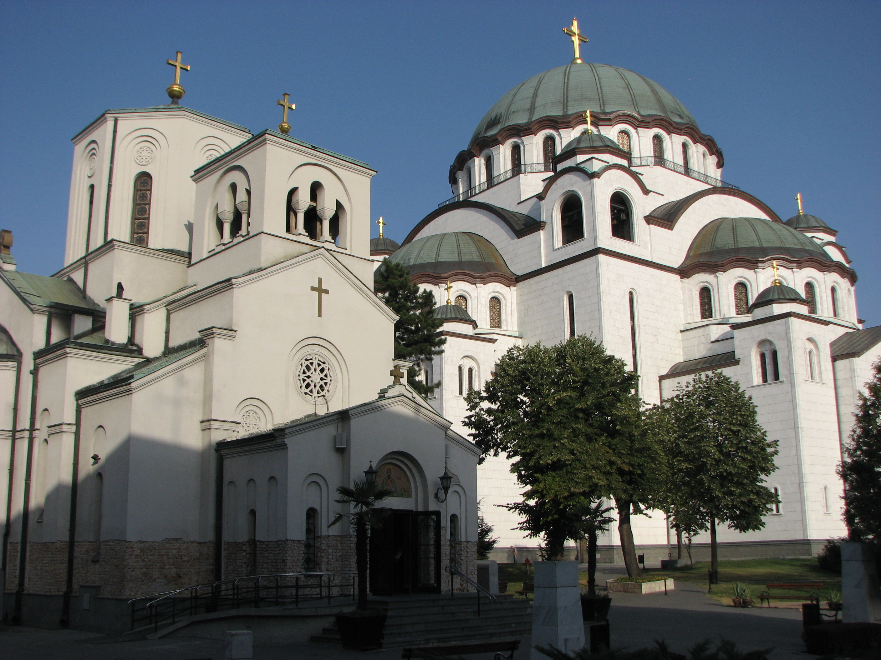 Temple of Saint Sava, Belgrade / Храм Светог Саве, Београд